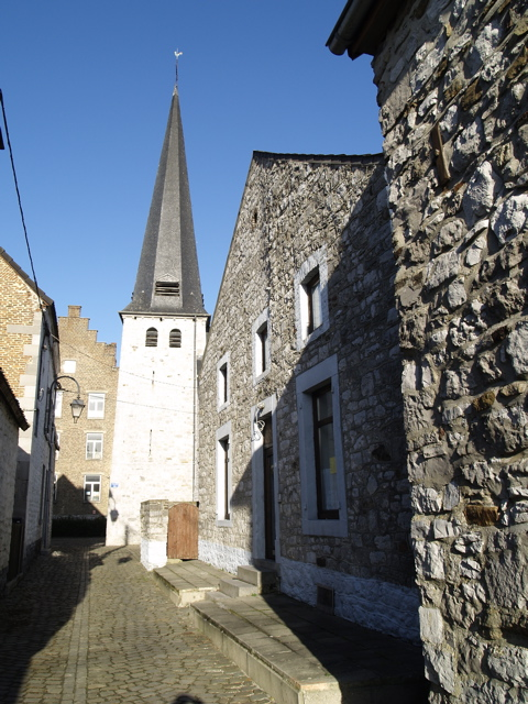 Eglise St Germain et place